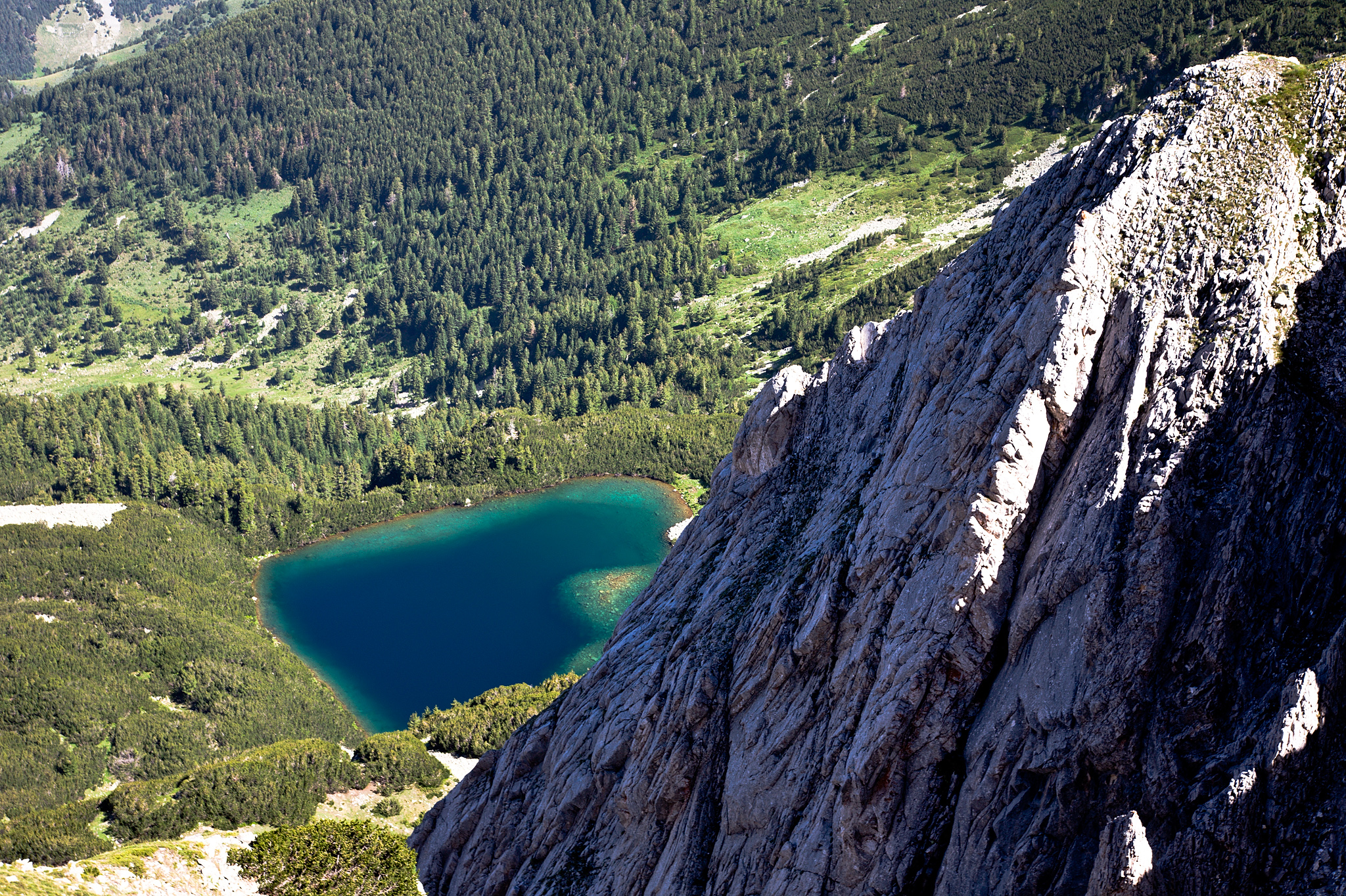 Пирин, Пирин, едно от Гергийските езера